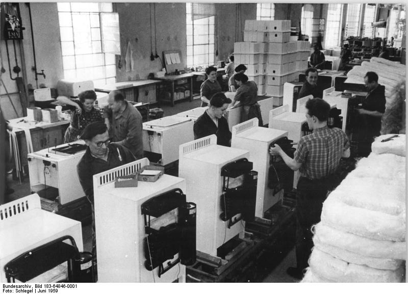 Zentralbild-Schlegel 9.6.1959 VEB DKK Scharfenstein wird Produktion bis 1965 um das Sechsfache steigern Bis 1965 wird der VEB DKK Scharfenstein im Kreis Zschopau, der Kühlschränke herstellt, seine Produktion um das Sechsfache steigern. Allein die Produktion von Haushaltskühlschränken wird bis 1965 um das 7,5 fache gesteigert. 1963 wird der Betrieb eine neue Produktionsstätte erhalten, wo nur Haushaltskühlschränke hergestellt werden. In Zukunft sollen nur noch Typen von Haushaltskühlschränken zu 60 Liter, 100 Liter und 160 Liter hergestellt werden. Ausserdem wird der Betrieb verschiedene Typen von Gewerbekühlschränken für Lebensmittelgeschäfte, Gaststätten usw. herstellen. Die Montage der Kühlschränke soll in Zukunft nur auf Fertigungsstraßen erfolgen. UBz. Die beiden Fertigungsstrassen für den 60 Liter Haushaltskühlschrank. Auf der rechten Strasse werden Haushaltskühlschränke zum Einbauen in Küchen hergestellt.